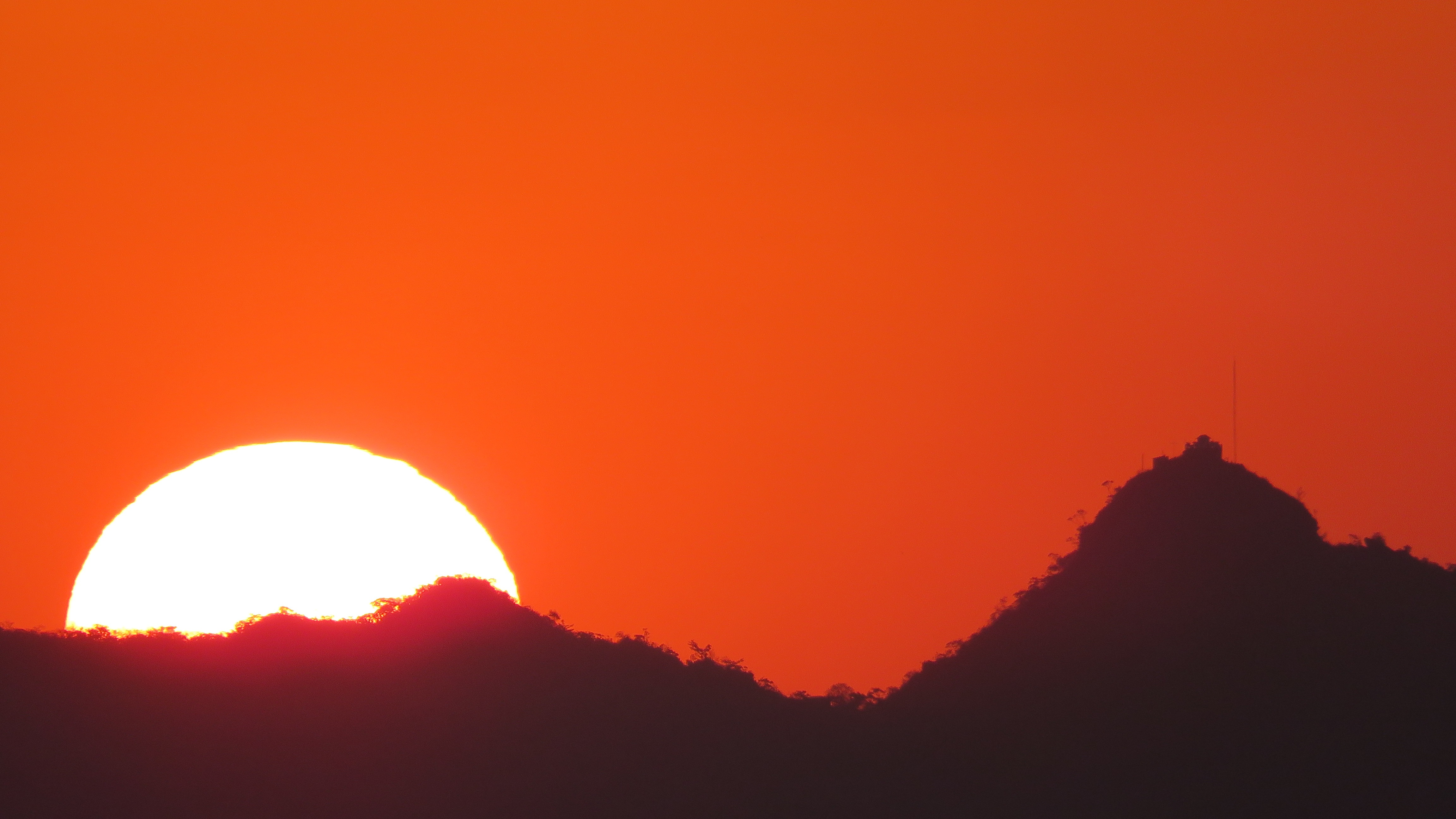 Pôr-do-sol observado das montanhas do Parque Estadual do Pireneus. Na direita do sol o Pico dos Pireneus com 1385 mts acima do mar e uma pequena igreja no cume.